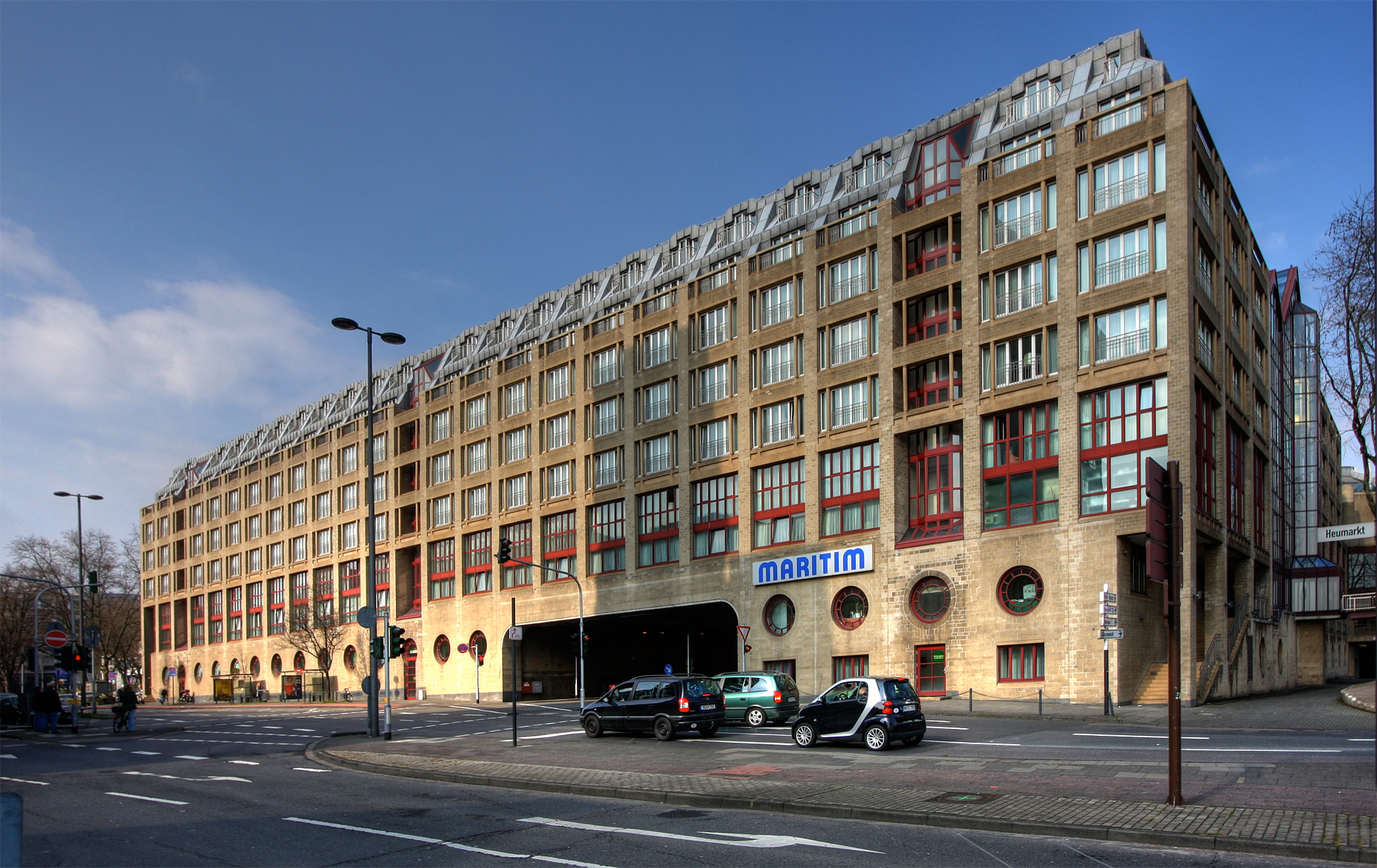 Maritim-Hotel in Köln, Südseite. Architekten: KSP/Gottfried Böhm